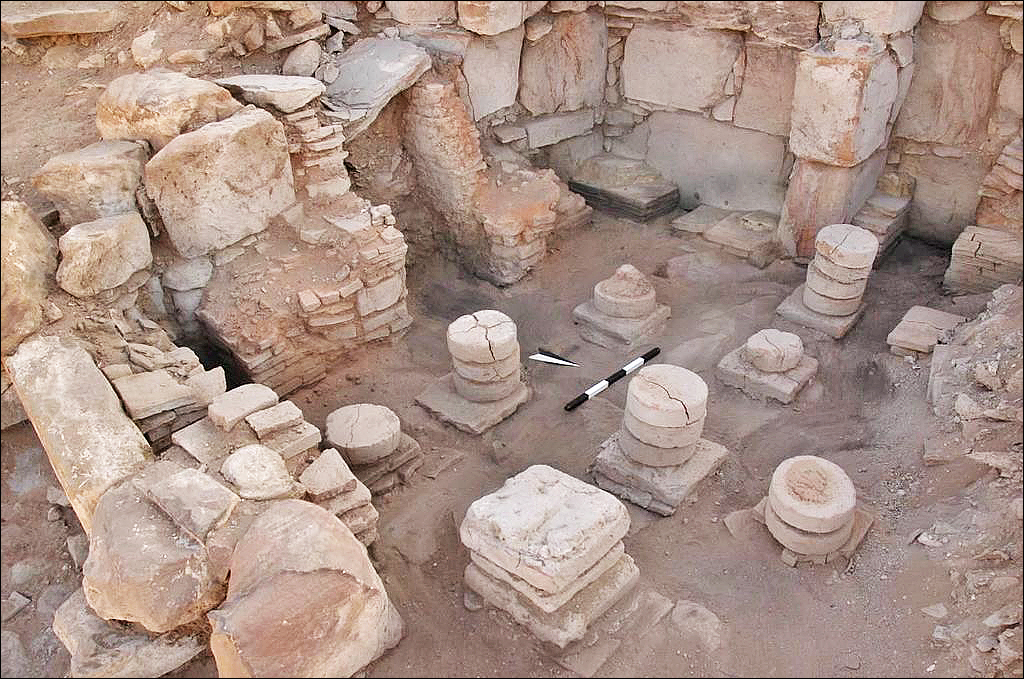 Pétra. Thermes de Biyarah. Vestiges d’un hypocauste.